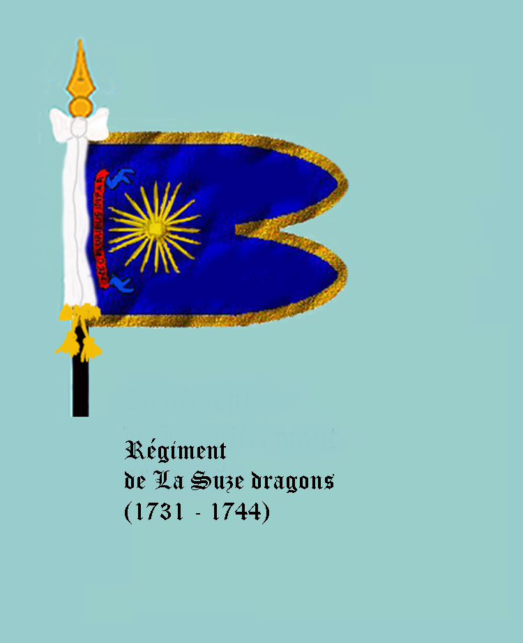 Guidon du régiment de La Suze dragons